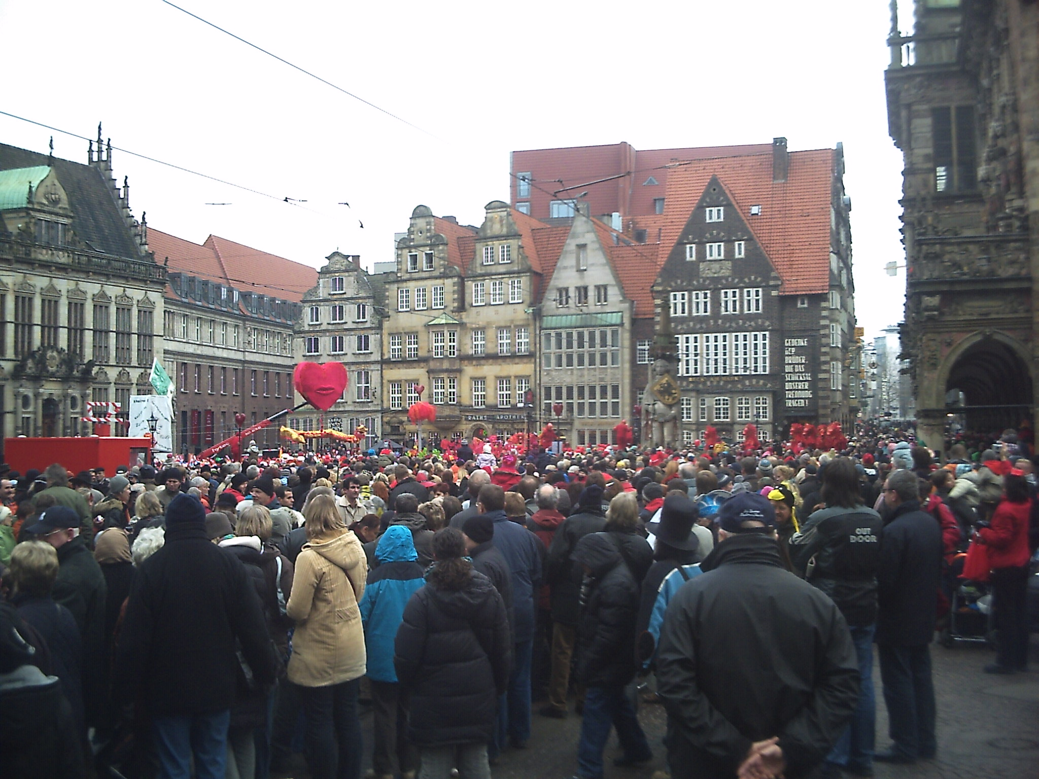 Eröffnung des Bremer Karnevals auf dem Marktplatz